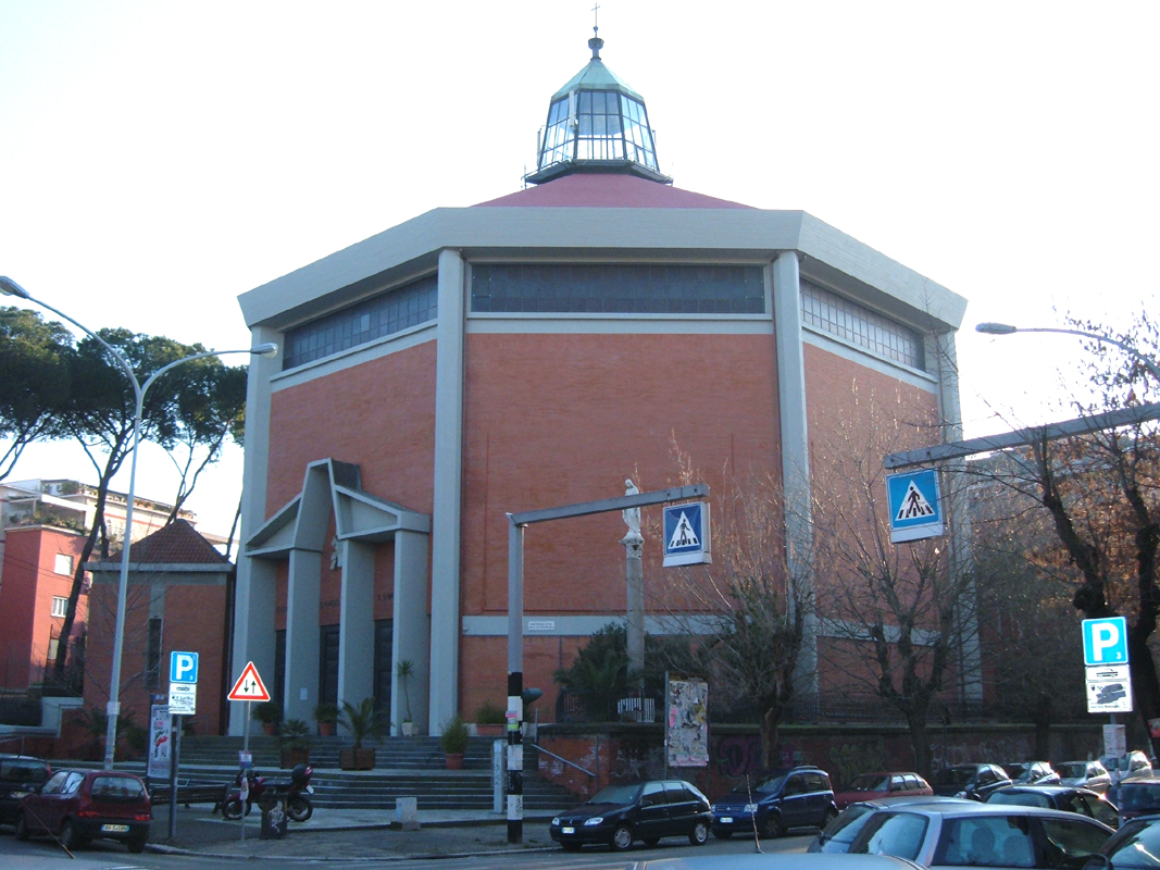 Chiesa di Sant'Angela Merici, a Roma, nel quartiere Nomentano.